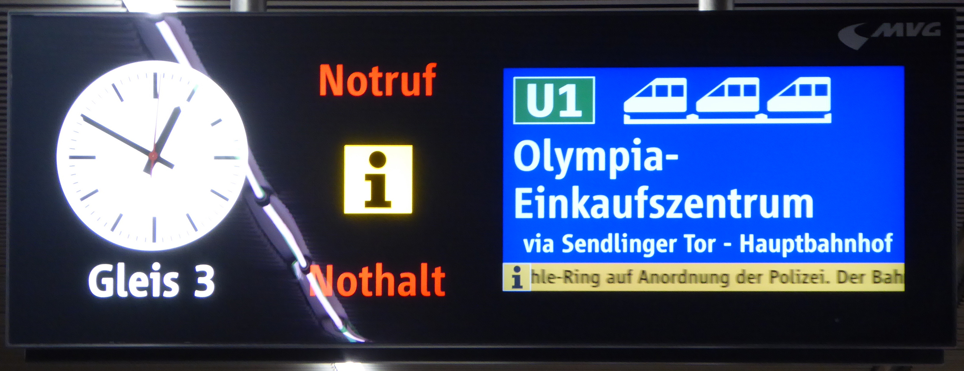 Nach dem Amoklauf vom Vorabend ist am 2016-07-23 der Münchner U-Bahnhof Olympia-Einkaufszentrum polizeilich gesperrt. Anzeigetext: „U1 endet/beginnt am Georg-Brauchle-Ring auf Anordnung der Polizei. Der Bahnhof Olympia-Einkaufszentrum wird nicht angefahren!“